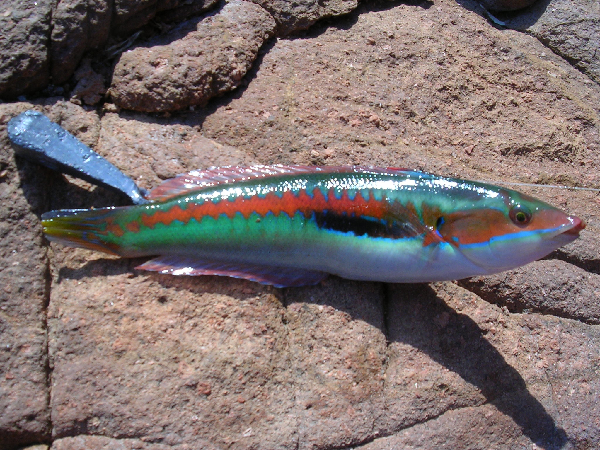 Coris julis Girelle aout 2006